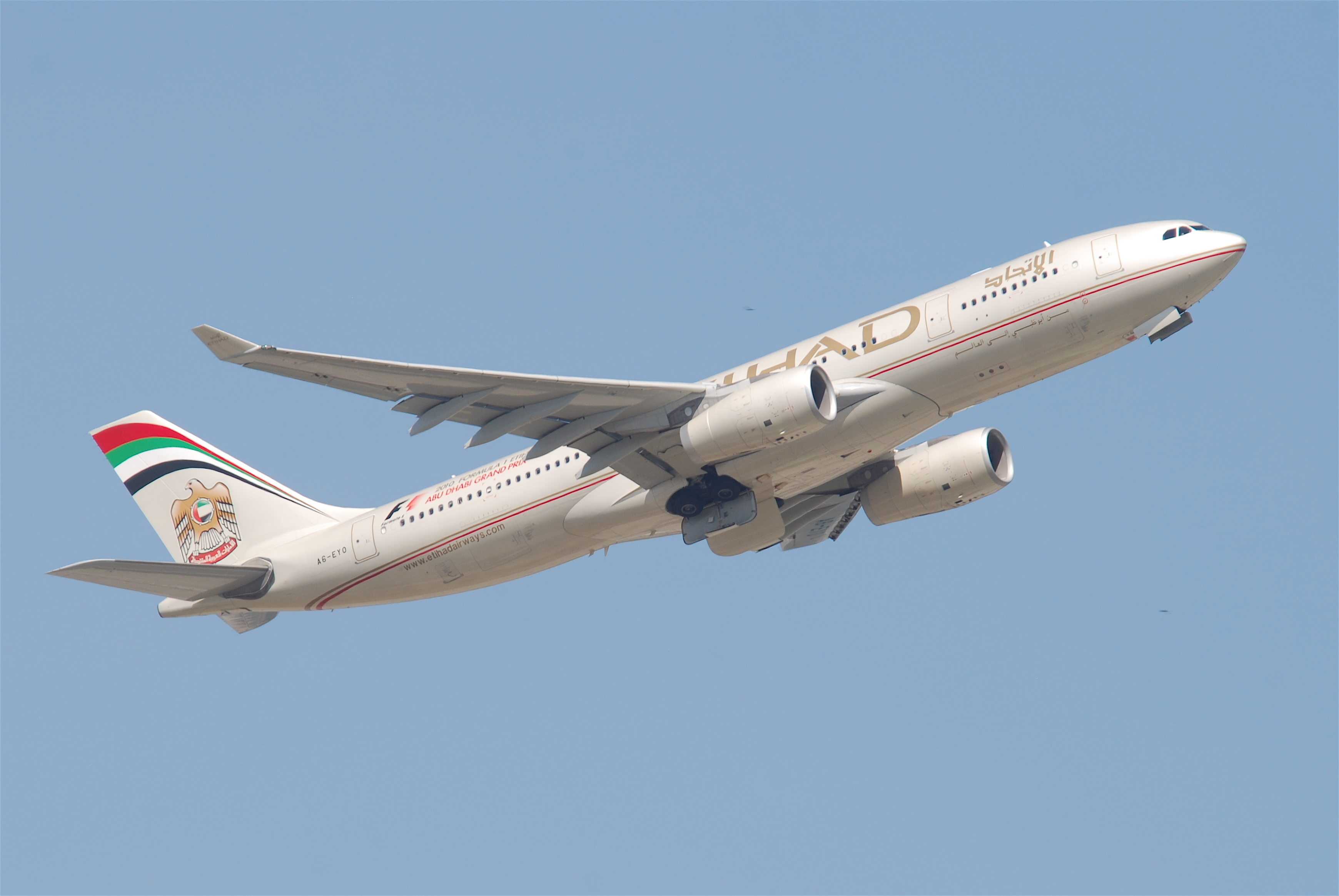 Etihad Airways Airbus A330-200; A6-EYO@FRA;09.07.2010/581fd